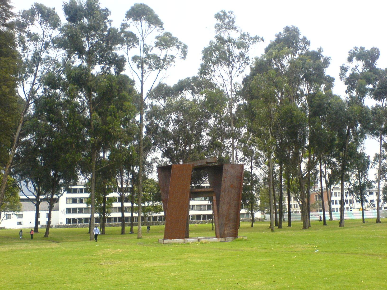 Doble Arco Caracol, de Eduardo Ramírez Villamizar. Esta escultura fue construida en 1994 y se encuentra ubicada en los bosques detrás de Aulas de Ingenieria